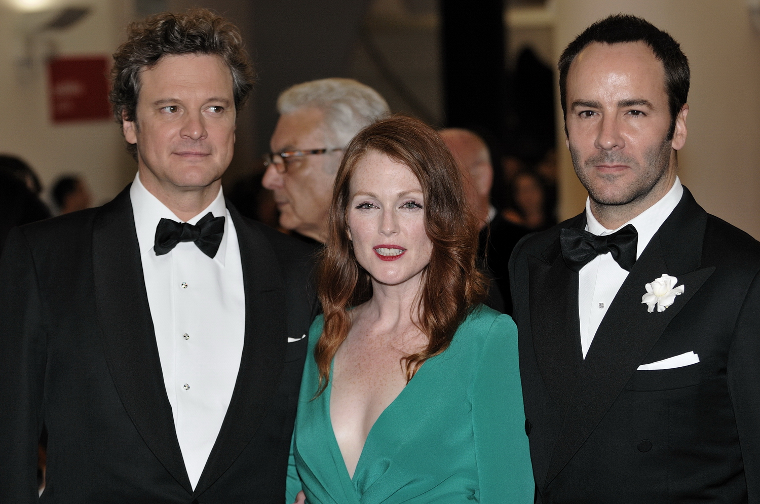 66ème Festival du Cinéma de Venise (Mostra), 10ème jour (11/09/2009) Tapis rouge avec Colin Firth, Julianne Moore, Matthew Goode et le réalisateur Tom Ford pour le film : A sigle Man